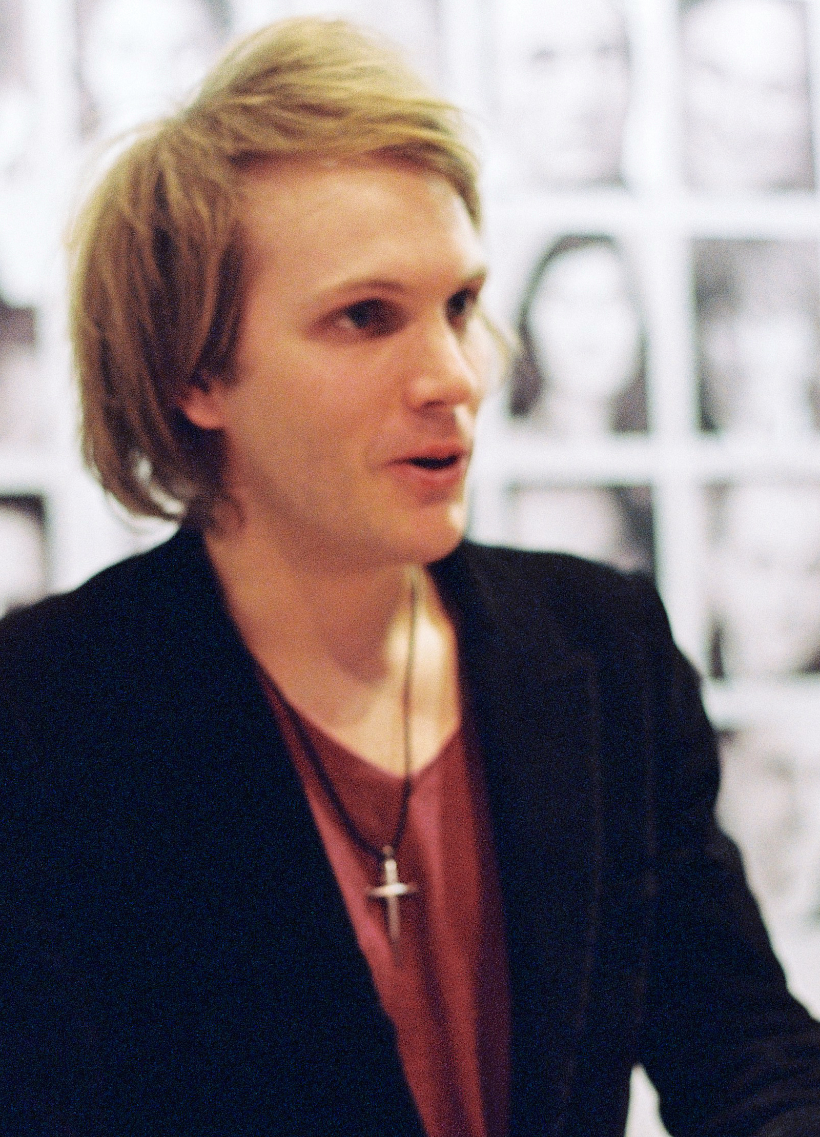 Salon du livre 2009 Paris